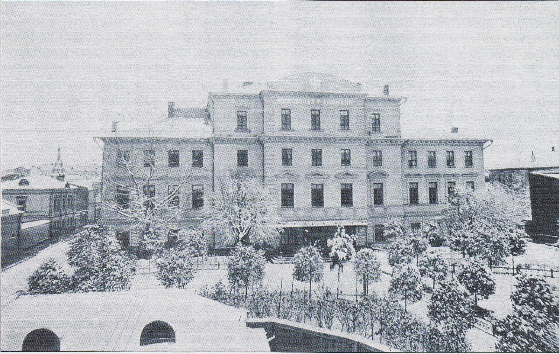 1-я Московская гимназия (из книги: Столетие Московской 1-й гимназии. — М., 1903)